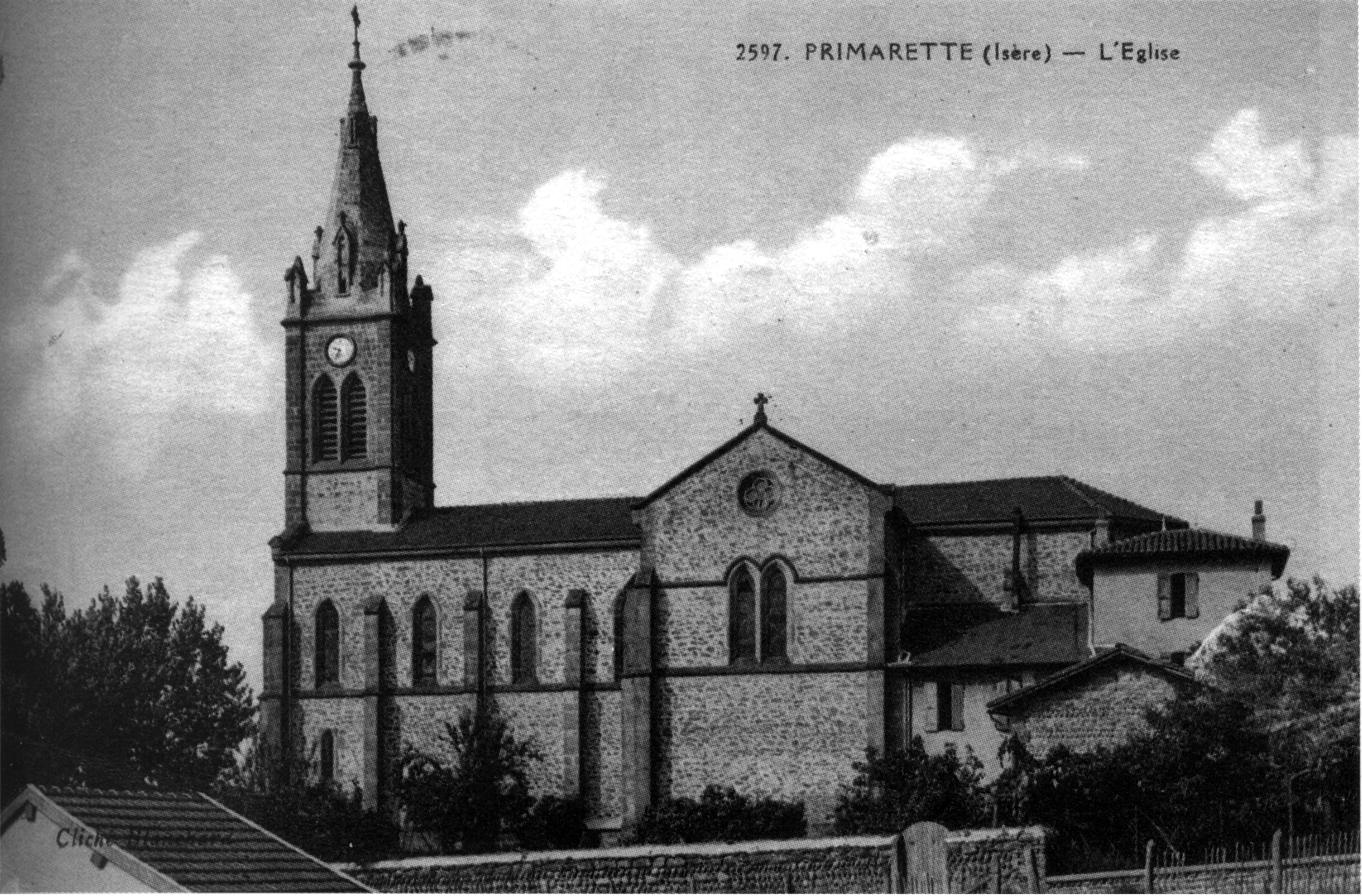 Primarette, l'église en 1911